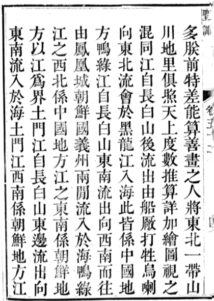 中文（台灣）: 清聖祖實錄卷五十二之部份截圖